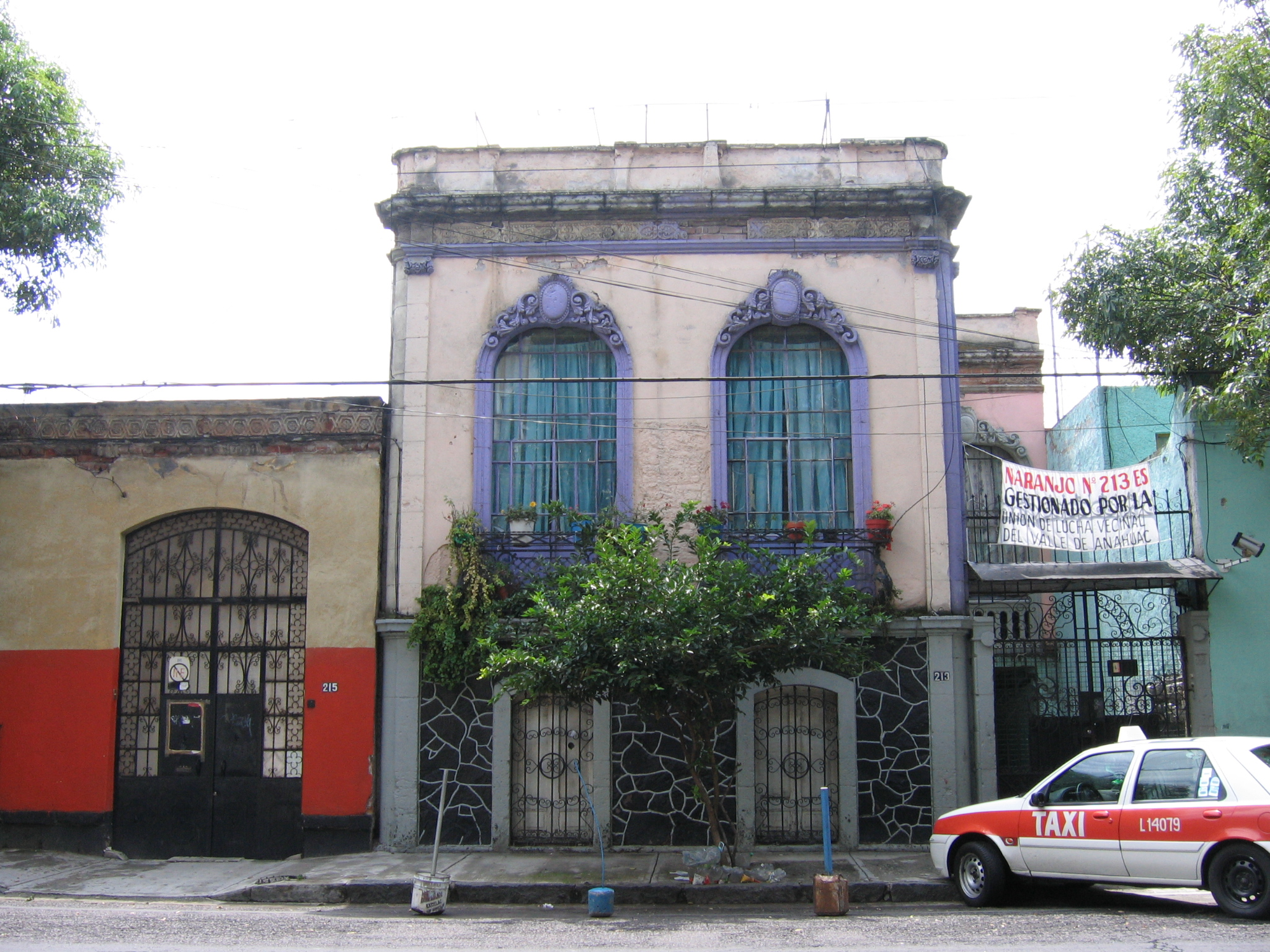 Santa Maria la Ribera, Mexico City, photo by Louise Ranck